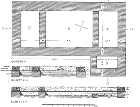 Grundriß des Wohnturmes der "Alten Burg" bei Homburg-Einöd